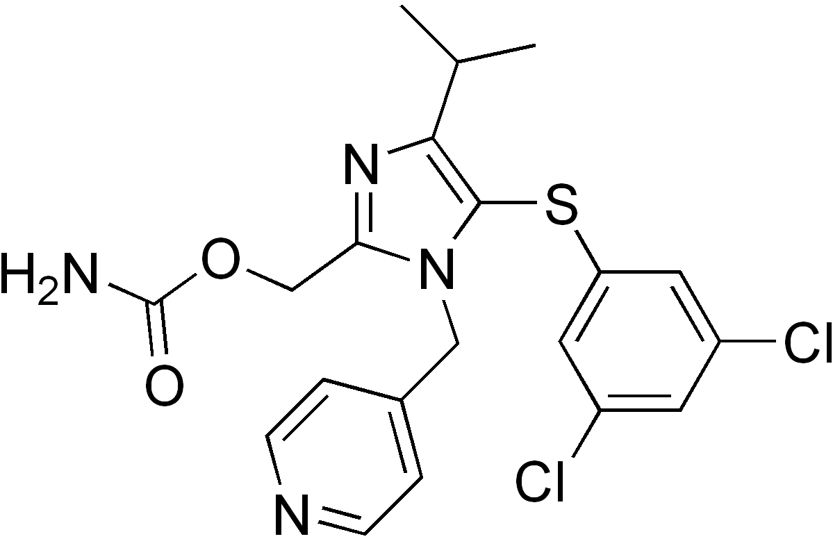 chemical structure of capravirine